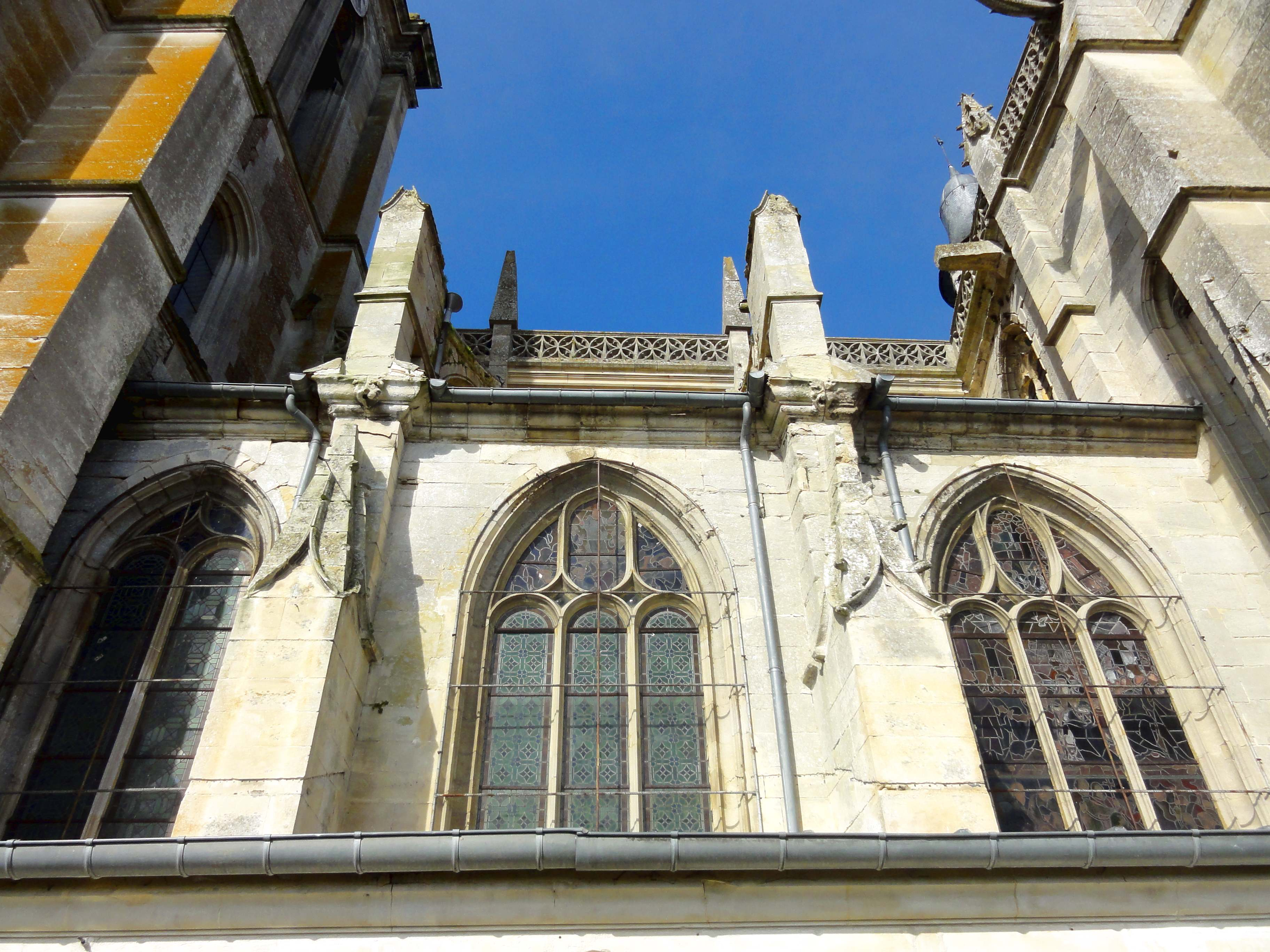 Église Saint-Jean-Baptiste de Chaumont-en-Vexin - voir titre.